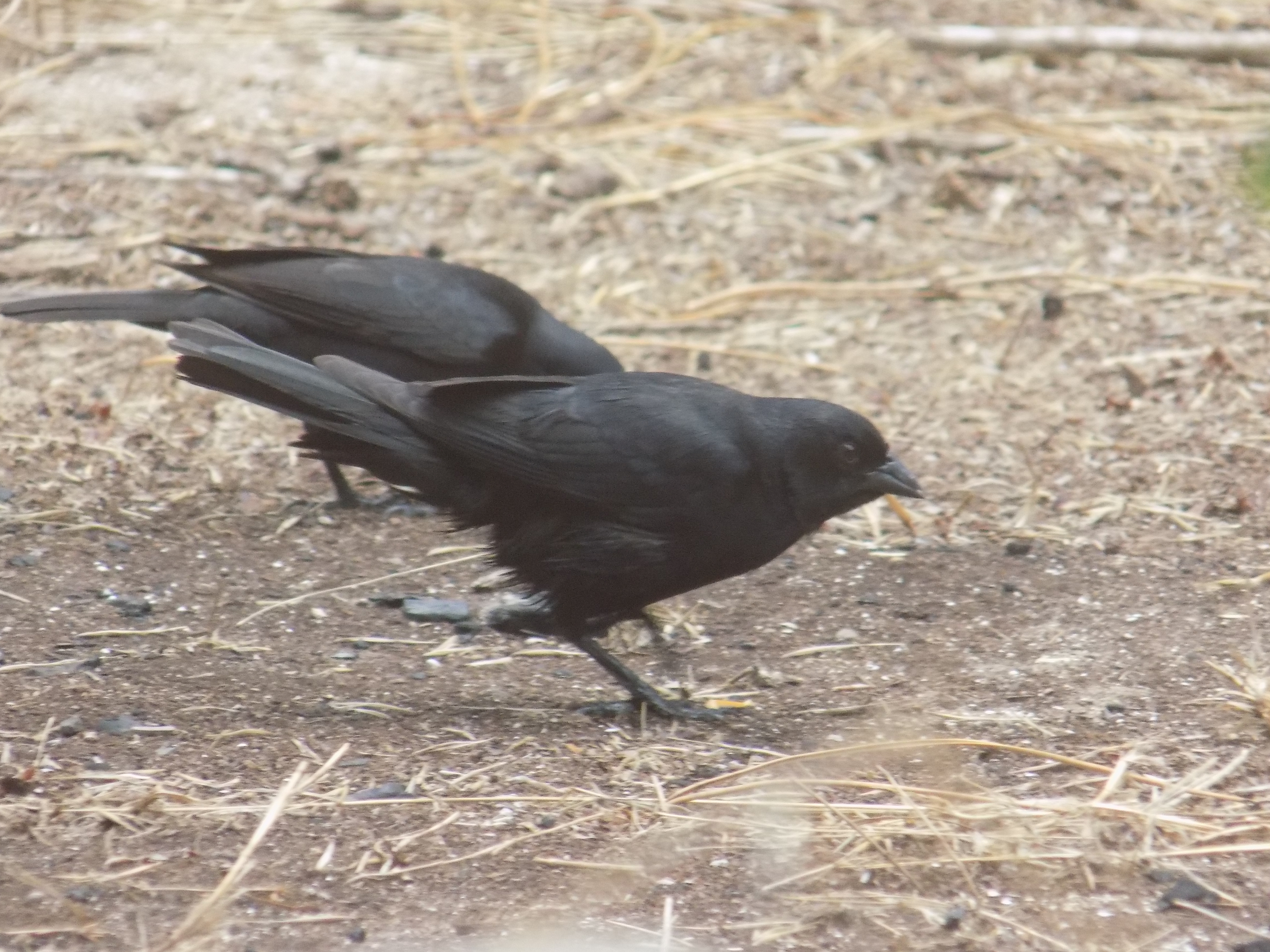 Dos pájaros tordos